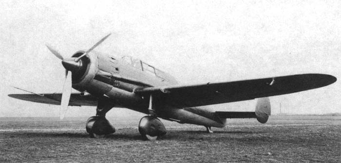 Polish dive bomber PZL.46 Sum/I prototype